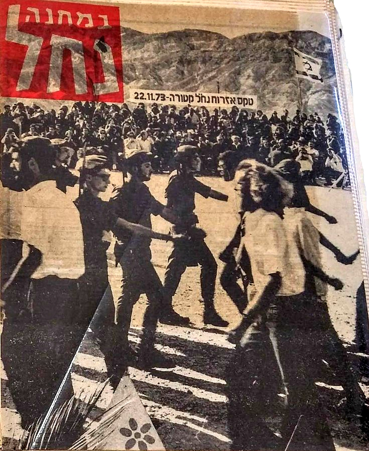 Bamahane Nahal